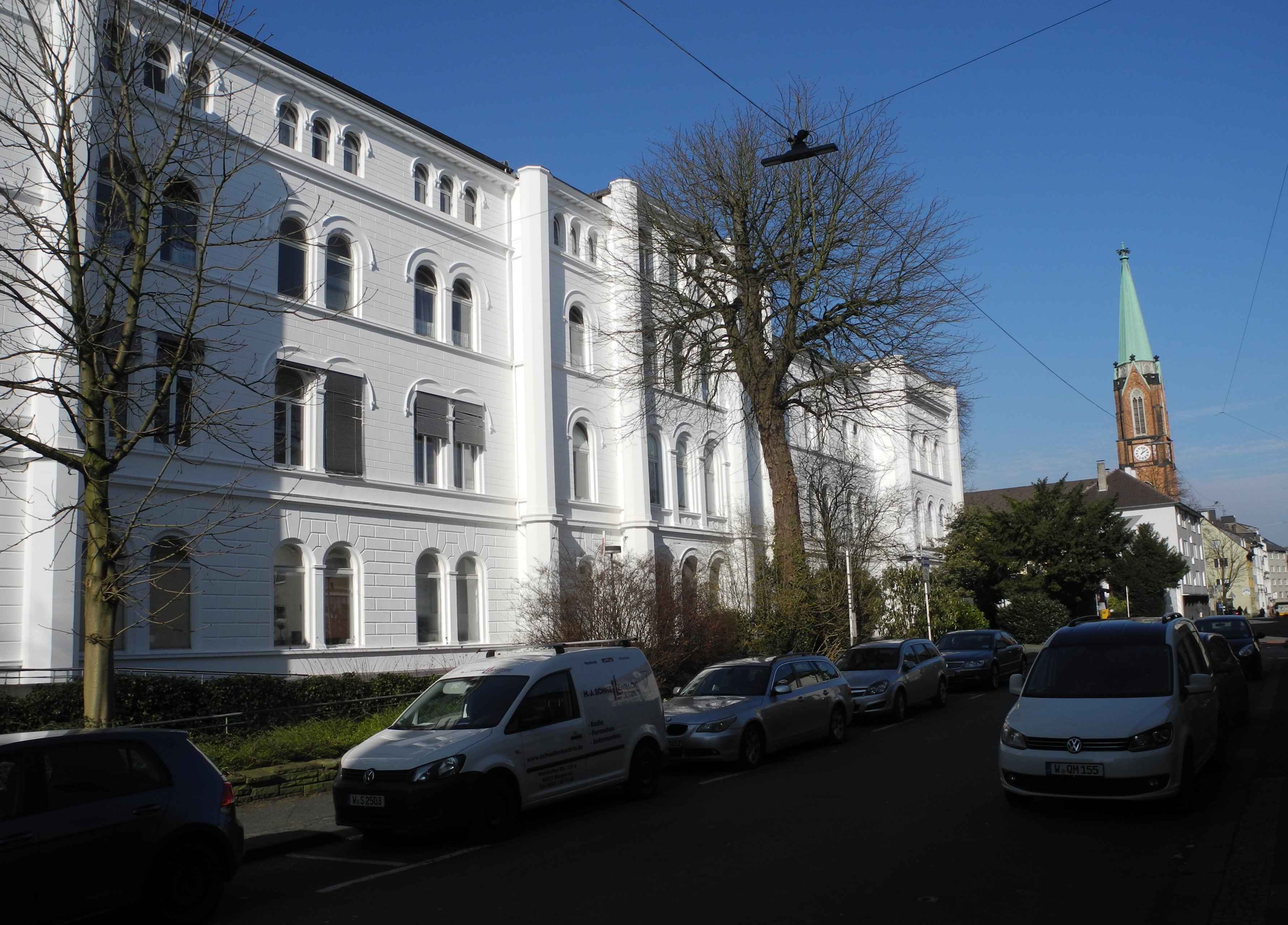 Wuppertal, Wohnquartier Arrenberg, ehem. Ferdinand-Sauerbruch-Klinikum, Haus 1, Straßenfront von Süden. Im Hintergrund der Kirchturm der ehem. ev. Trinitatiskirche (heute profaniert).